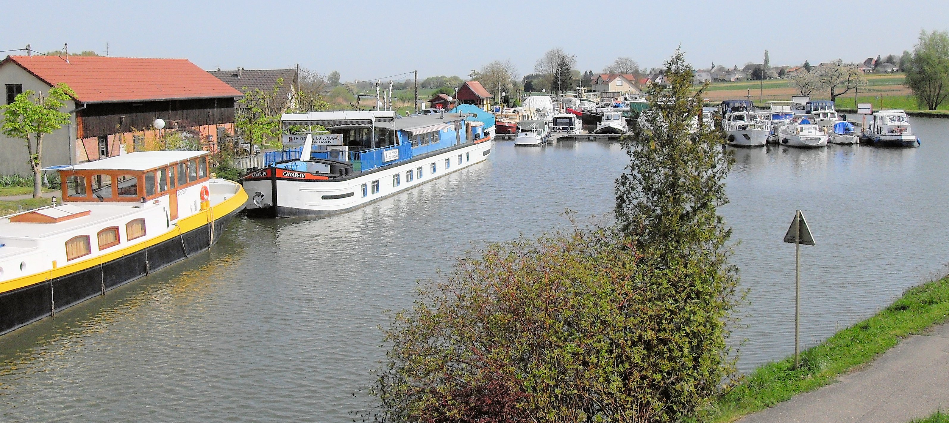 Le port de plaisance à Wolfersdorf, Canal du Rhône au Rhin